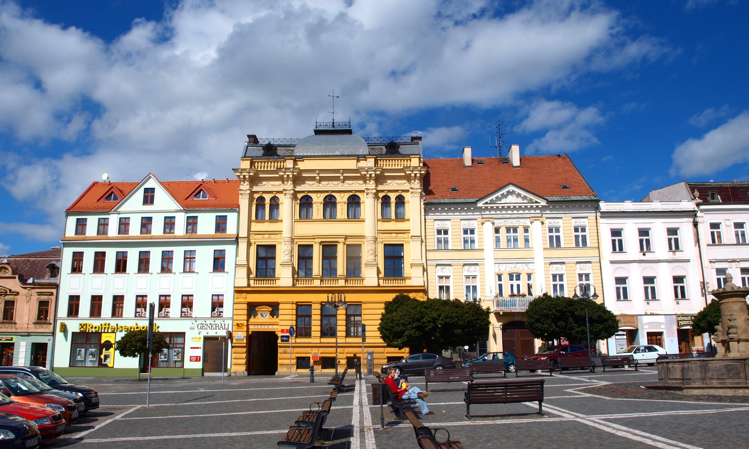 Česká Lípa